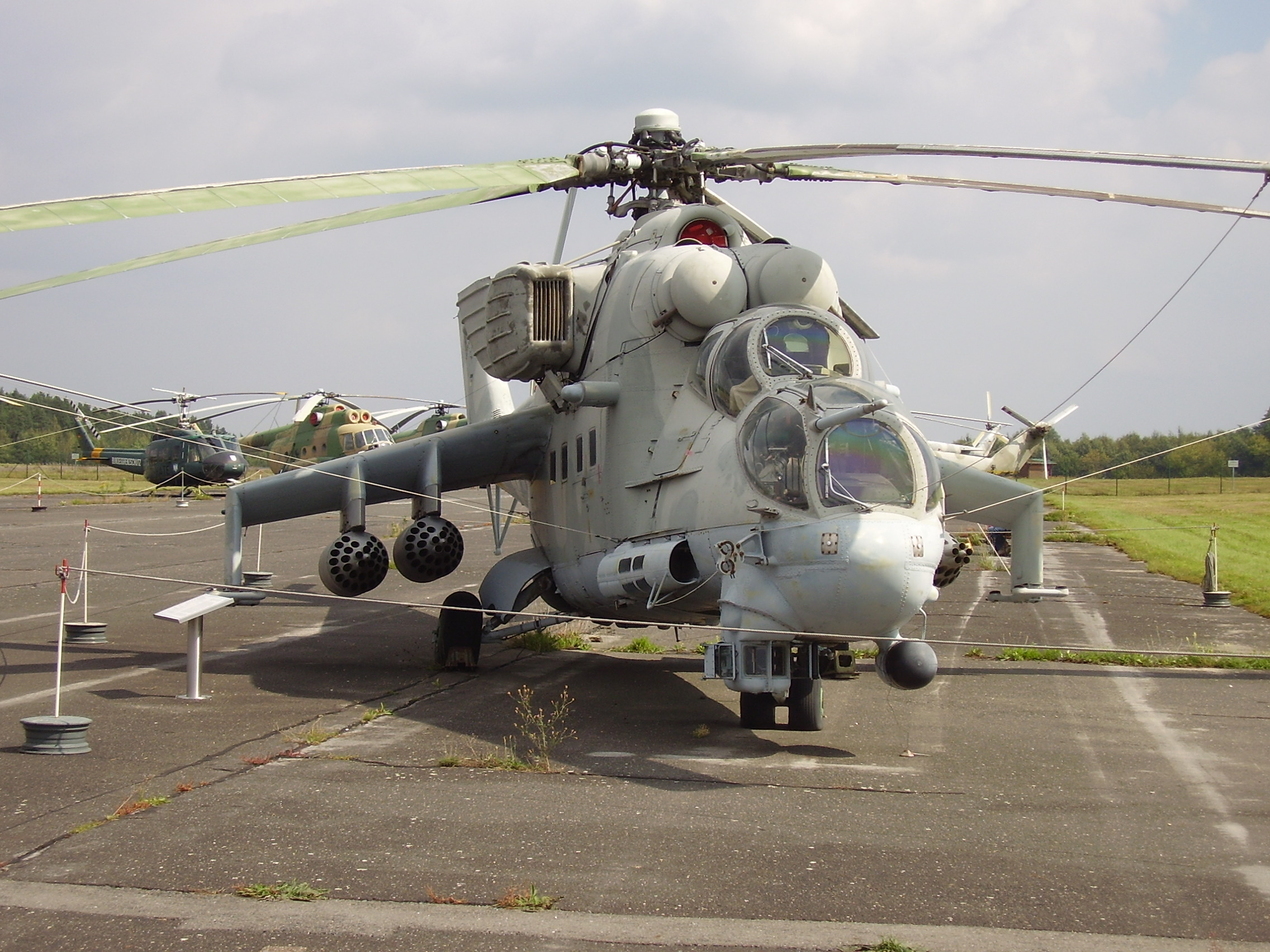 Luftwaffenmuseum der Bundeswehr; Airforce Museum of the Bundeswehr; Berlin-Gatow, Mi-24P